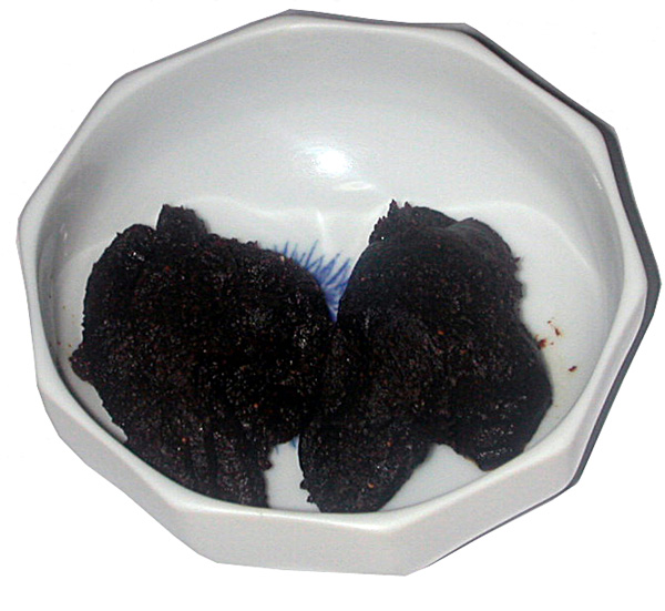 撮影者：小太刀 赤出し八丁味噌 向かって右側の塊が「まるや八丁味噌ゴールド赤だし」で、向かって左側の塊が「カクキュー三州岡崎赤出し八丁味噌」です。赤出し八丁味噌というのは八丁味噌に京都などで作られている米味噌を加えて味を調えた調合味噌（あわせ味噌）です。